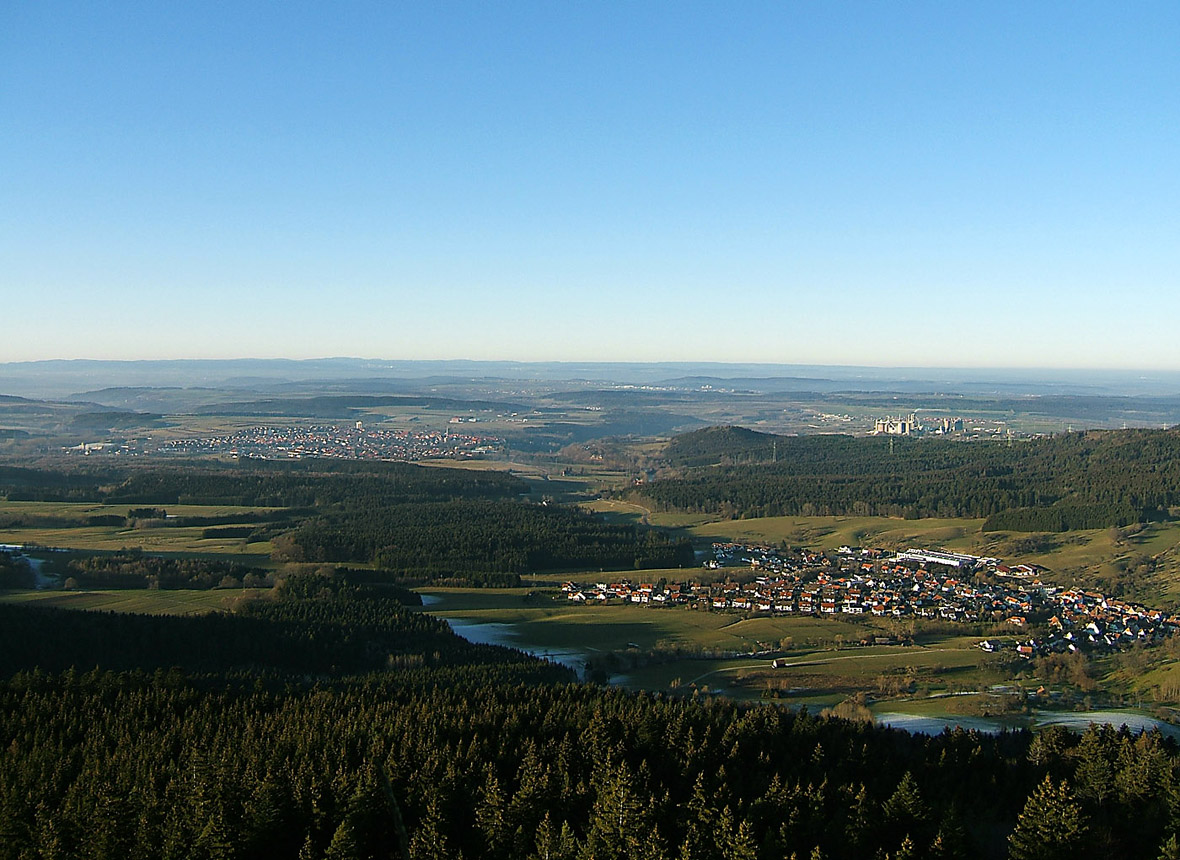 Blick nach Norden vom Ortenberg aus auf Ratshausen (vorne), Schömberg (links) und Dotternhausen (rechts) bis über den Kleinen Heuberg.